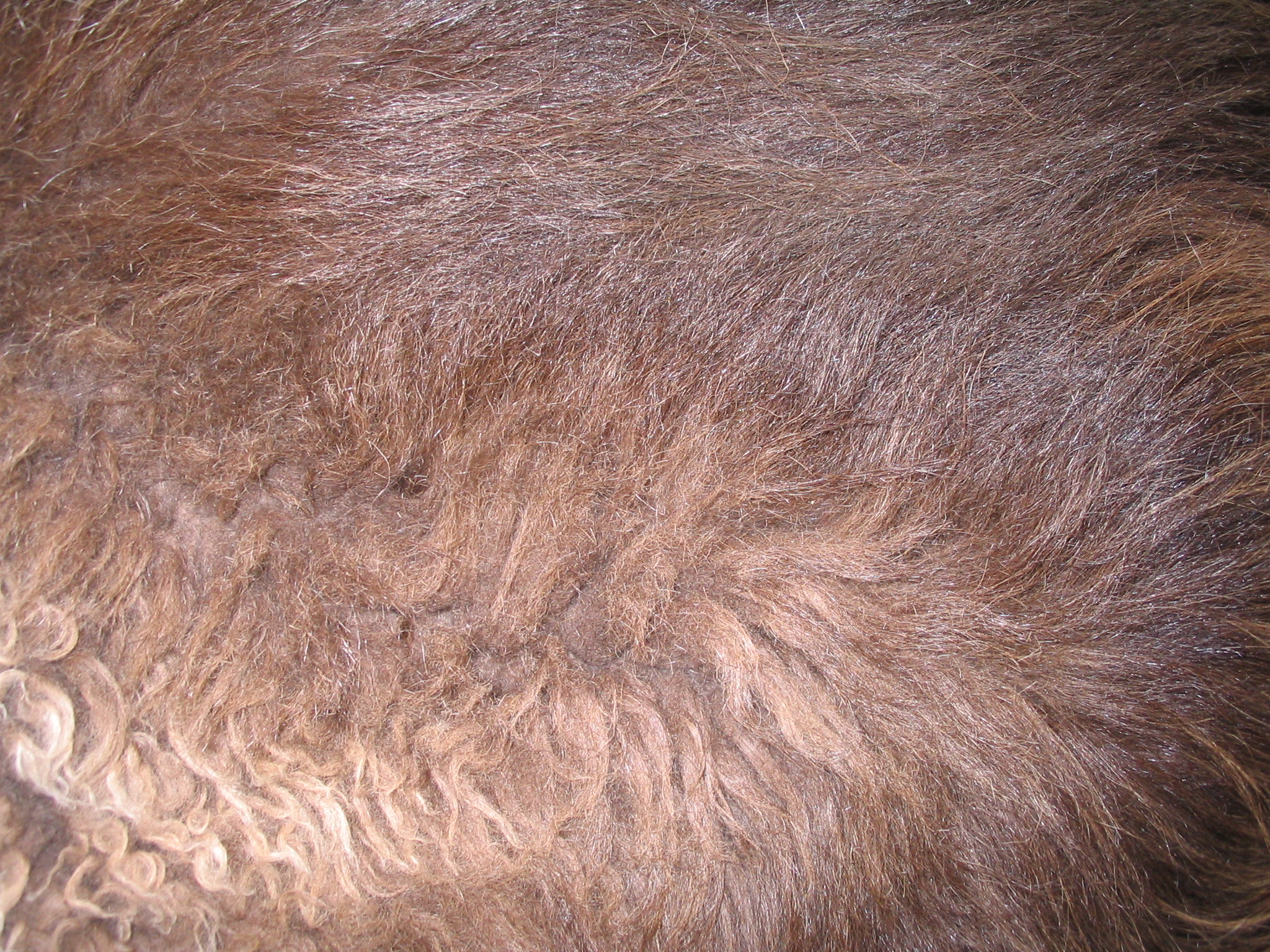 Moschusochsenfell (Ausschnitt). Gesehen bei Karl Friedrich Herhold.